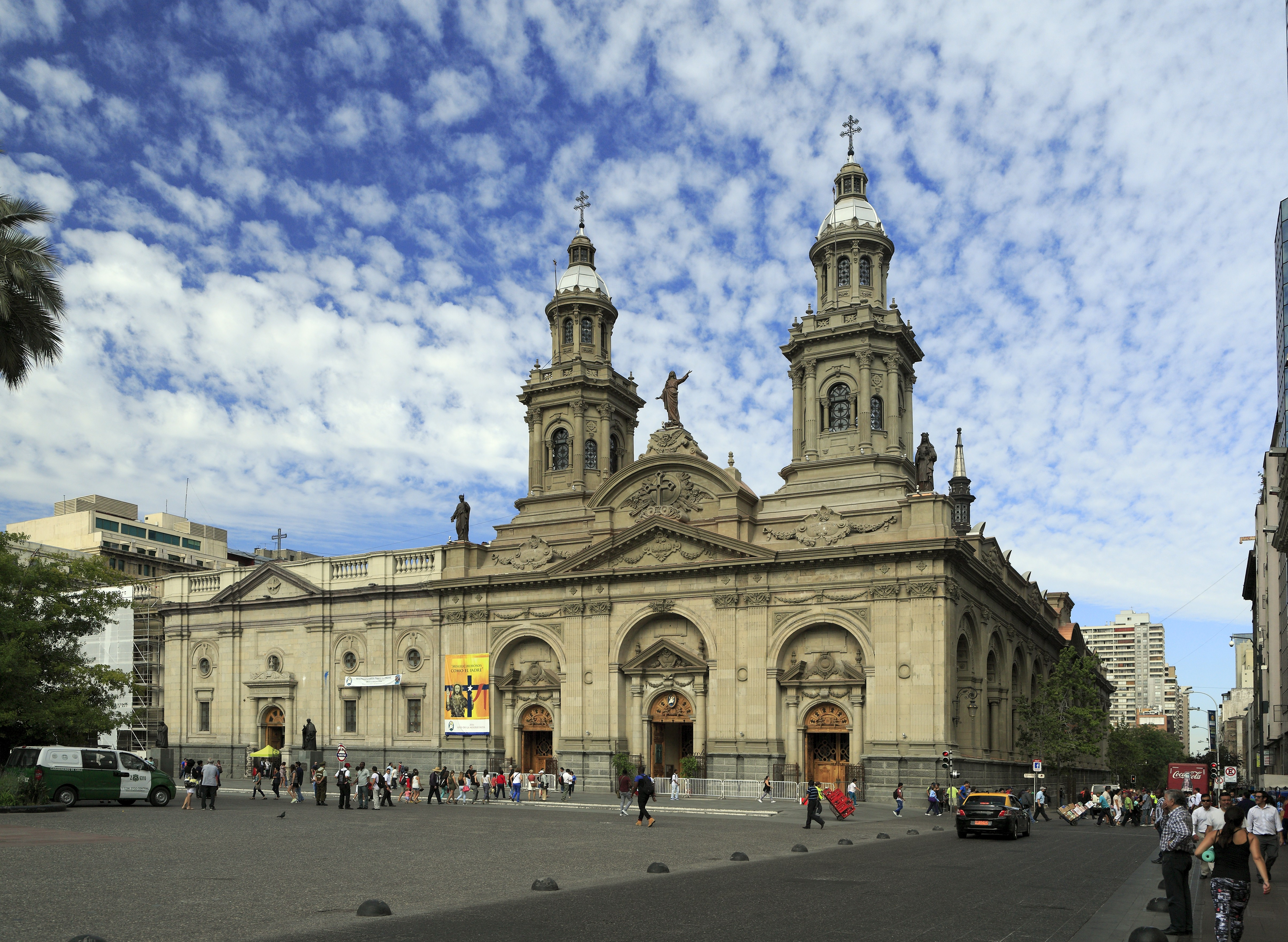 An der Plaza de Armas im Zentrum von Santiago. Der Name taucht in vielen lateinamerikanischen Großstädten auf, er entspricht der Plaza Mayor in spanischen Städten. Rechts neben der Kathedrale die Calle Catedrál. Diese Straße zieht sich aufgrund des regelmäßigen und rechtwinkligen Straßenrasters durch das Zentrum bis zum Parque Quinta normal, östlich der Plaza de Armas heißt sie Calle Monjitas. This is a photo of a national monument in Chile: 210